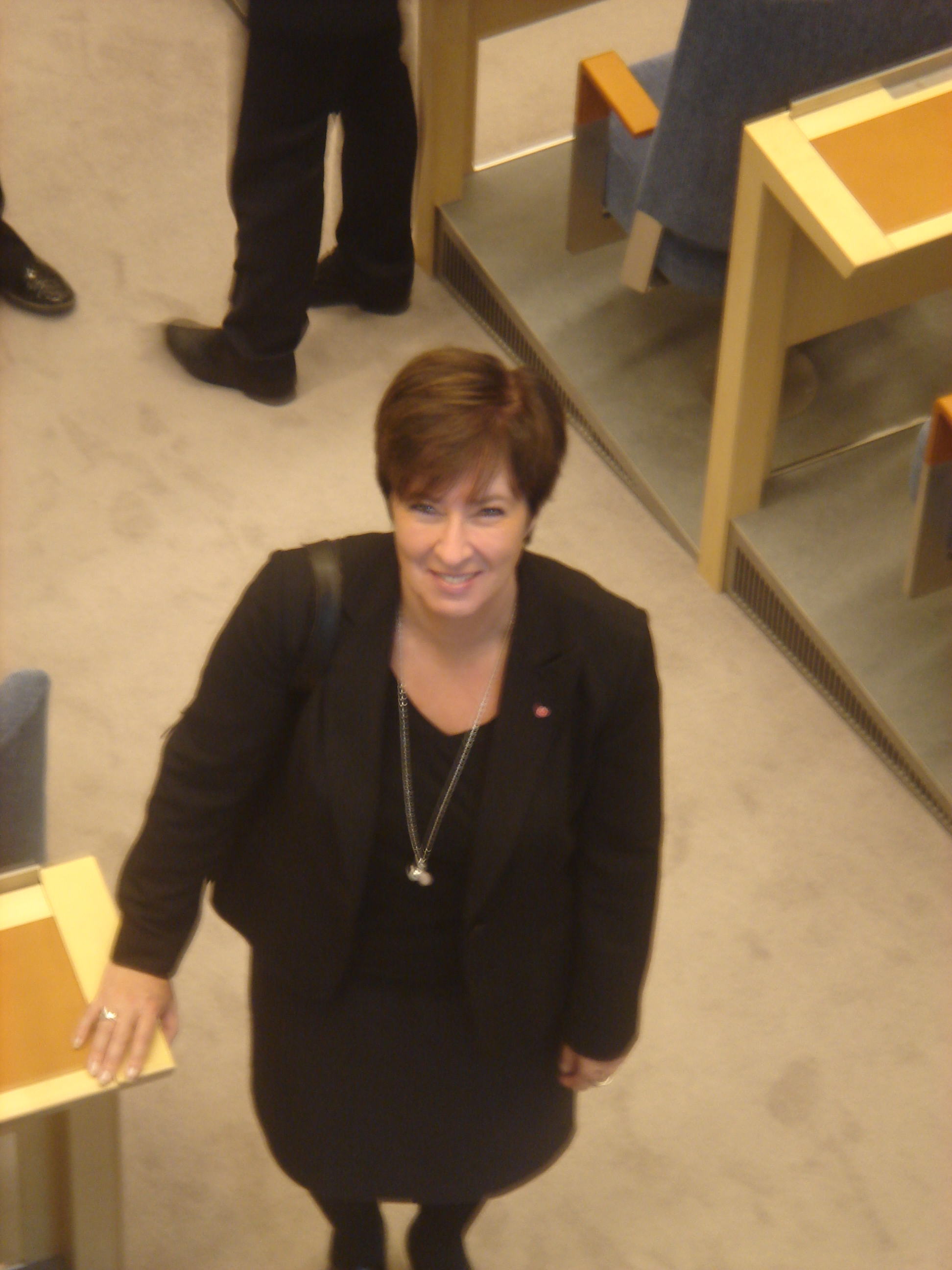 صورة للسيدة منى سالين زعيمة جبهة اليسار في السويد